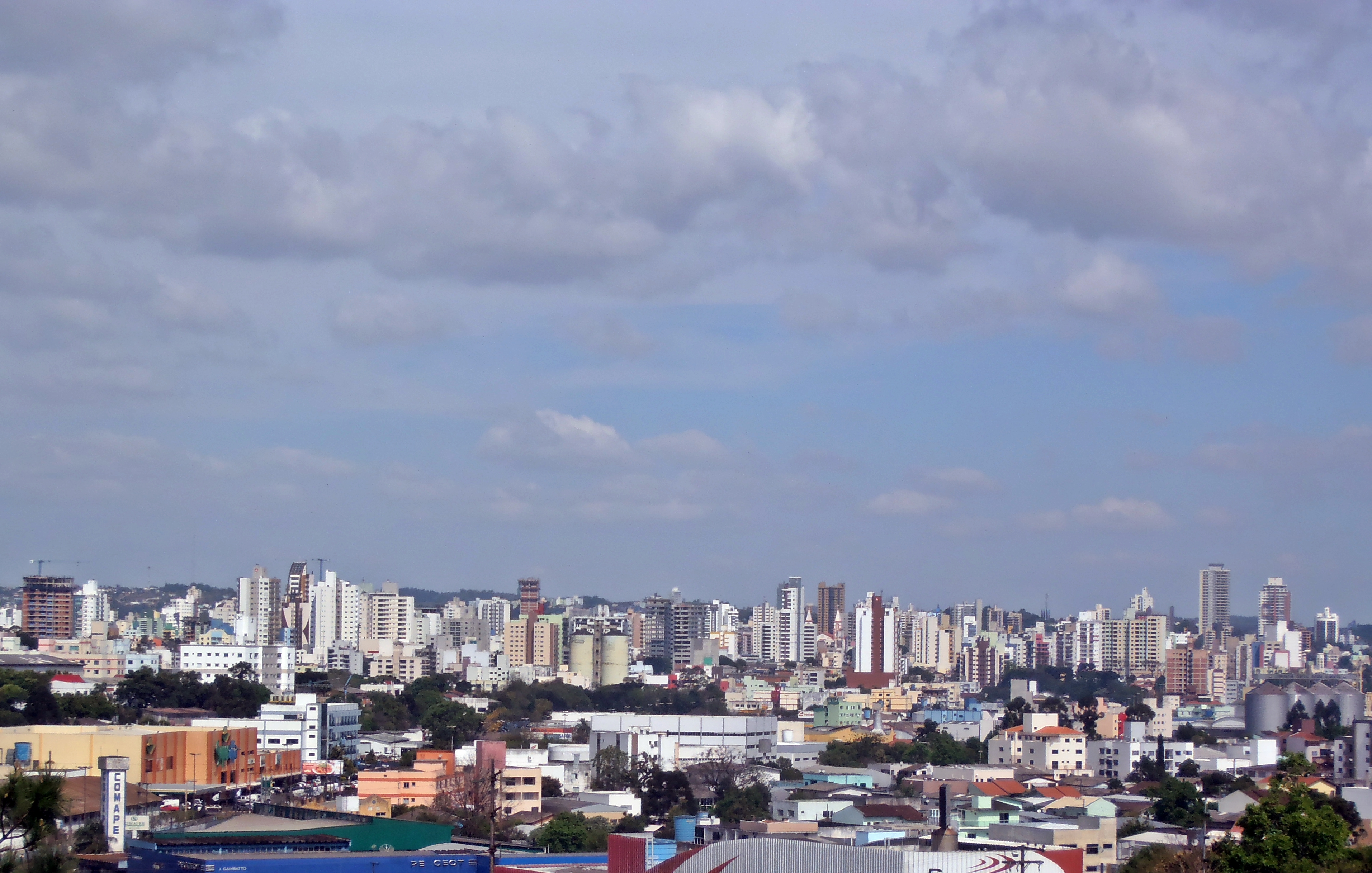 Vista parcial da cidade, Setembro de 2016